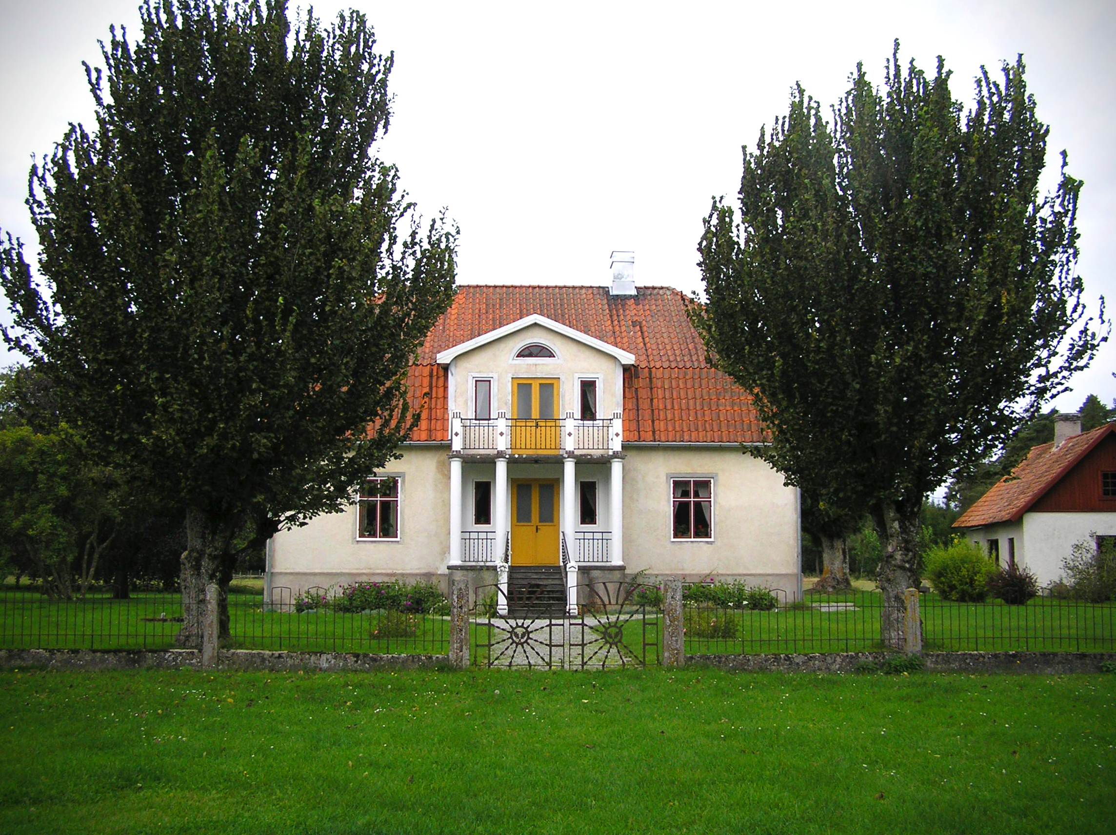 Norrbys museigård och kulturreservat (huvudbyggnaden), Gotland